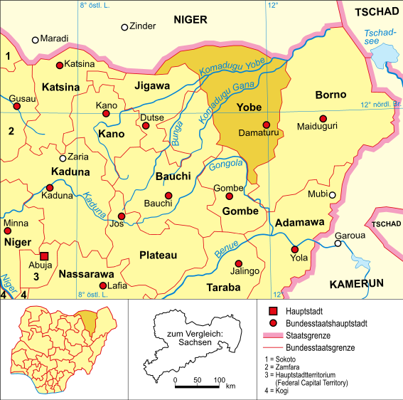 Politische Karte Nigerias (Bundesstaat Yobe hervorgehoben)